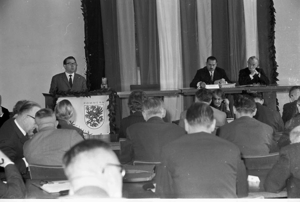 im Landeshaus.